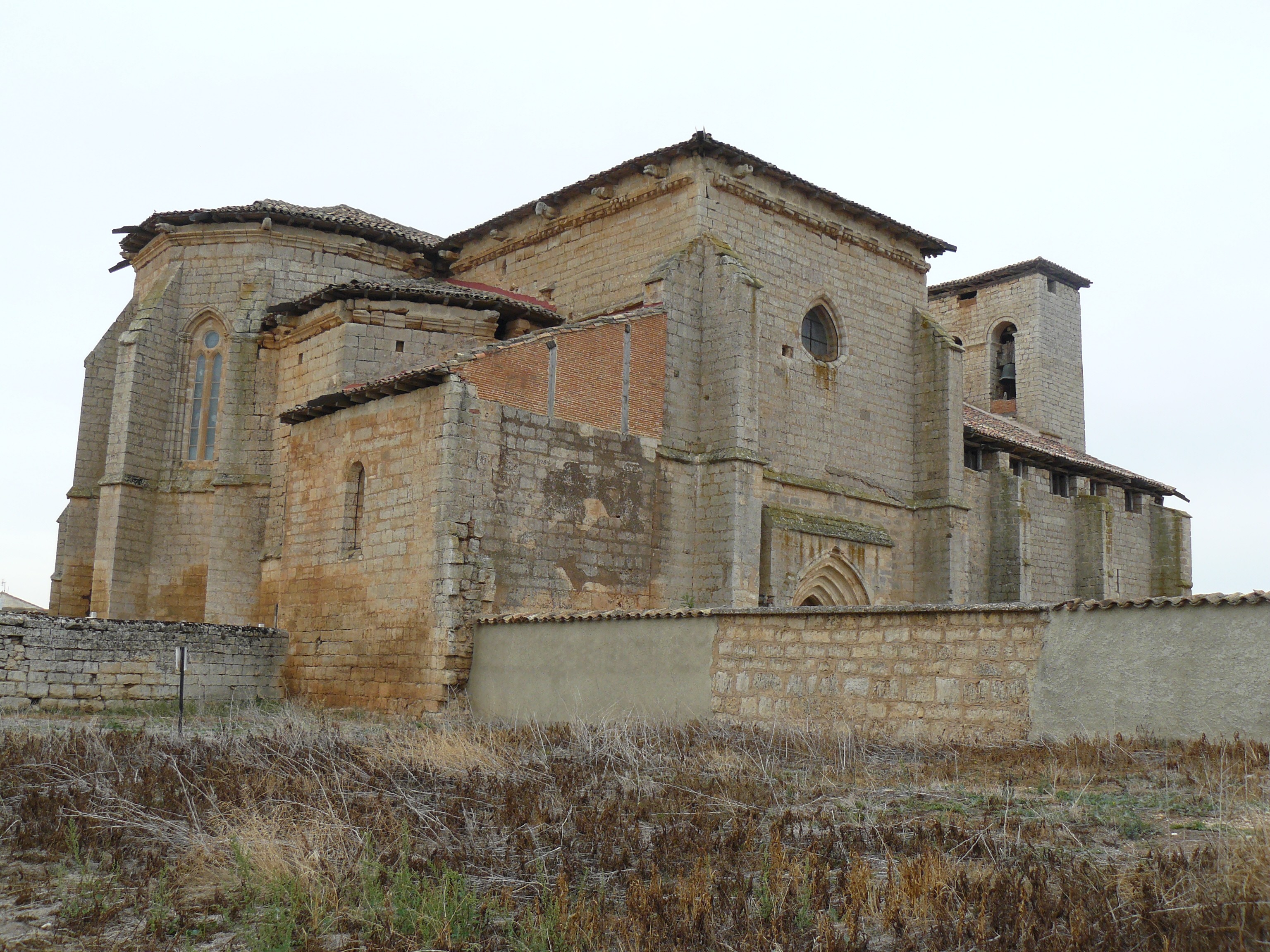 Iglesia de Nuestra Señora de los Reyes, Grijalba, Burgos.